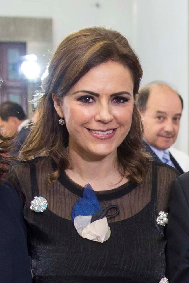 Hilda Flores Escalera, senadora de México de 2012 a 2018